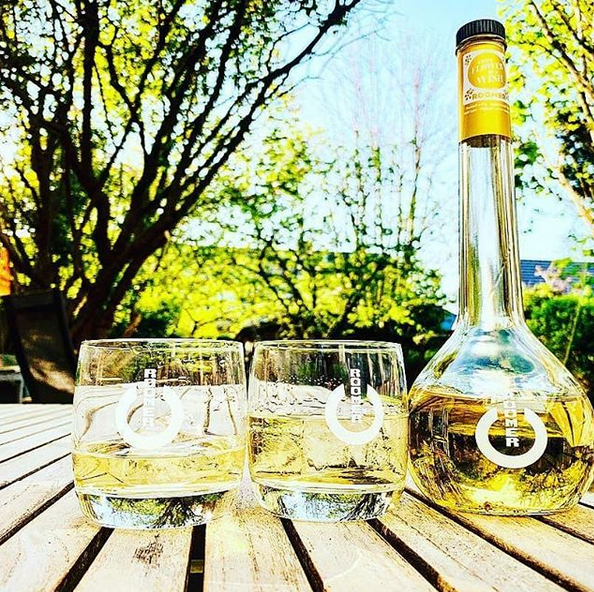 RoomeR met de typische zwevende vlierbloemen in iedere fles.